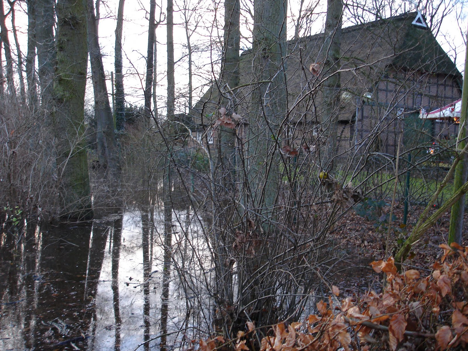 Germany, Heeslingen